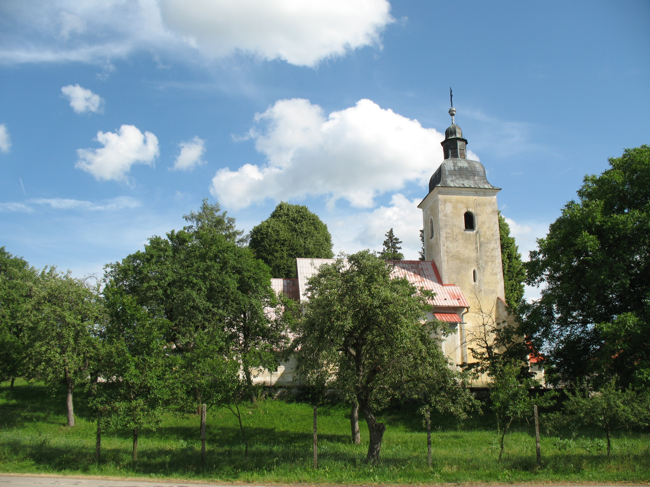 Bobót